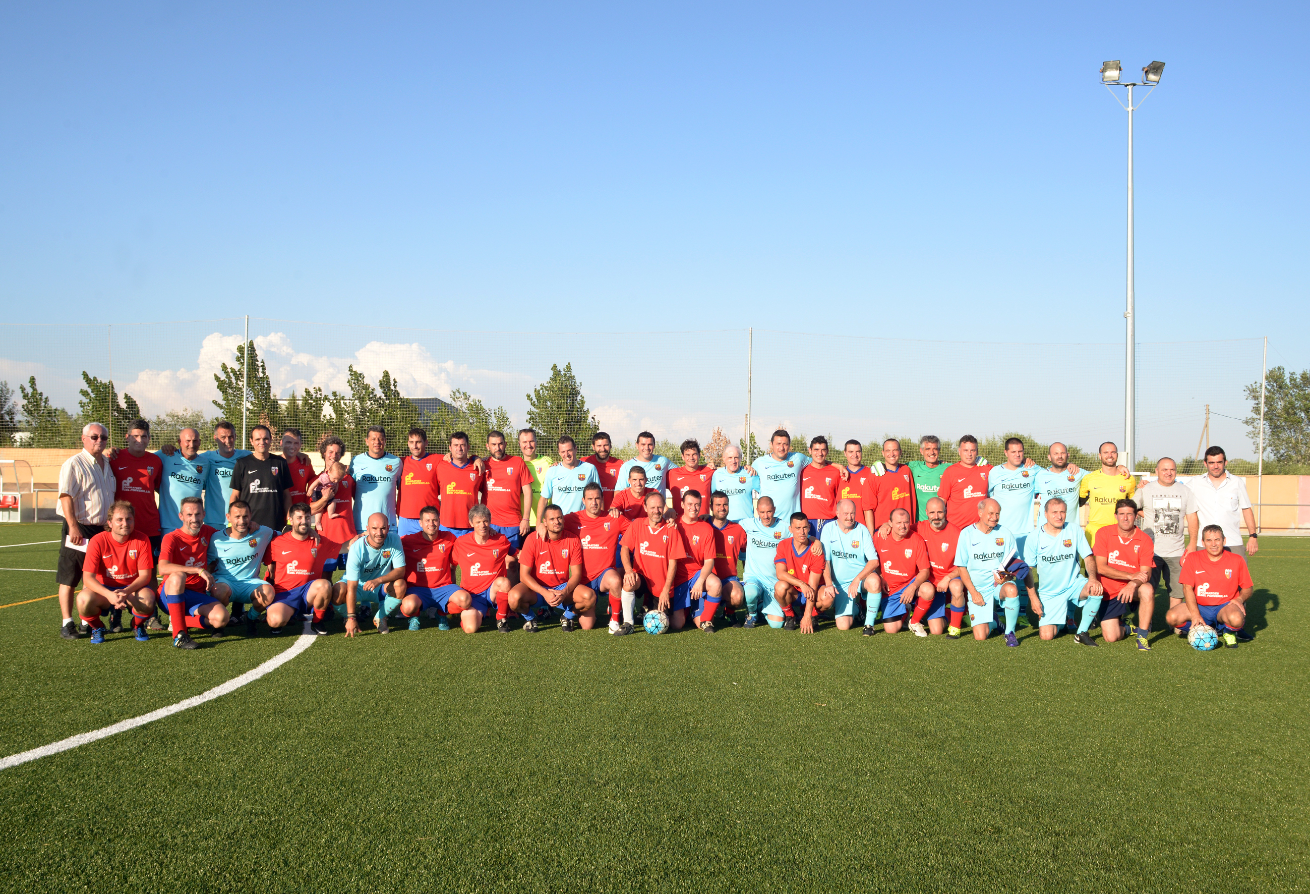 Veterans CF Juneda - Agrupació Veterans Barça (07-07-2018)